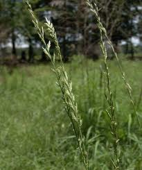 detalle del cultivo en campo